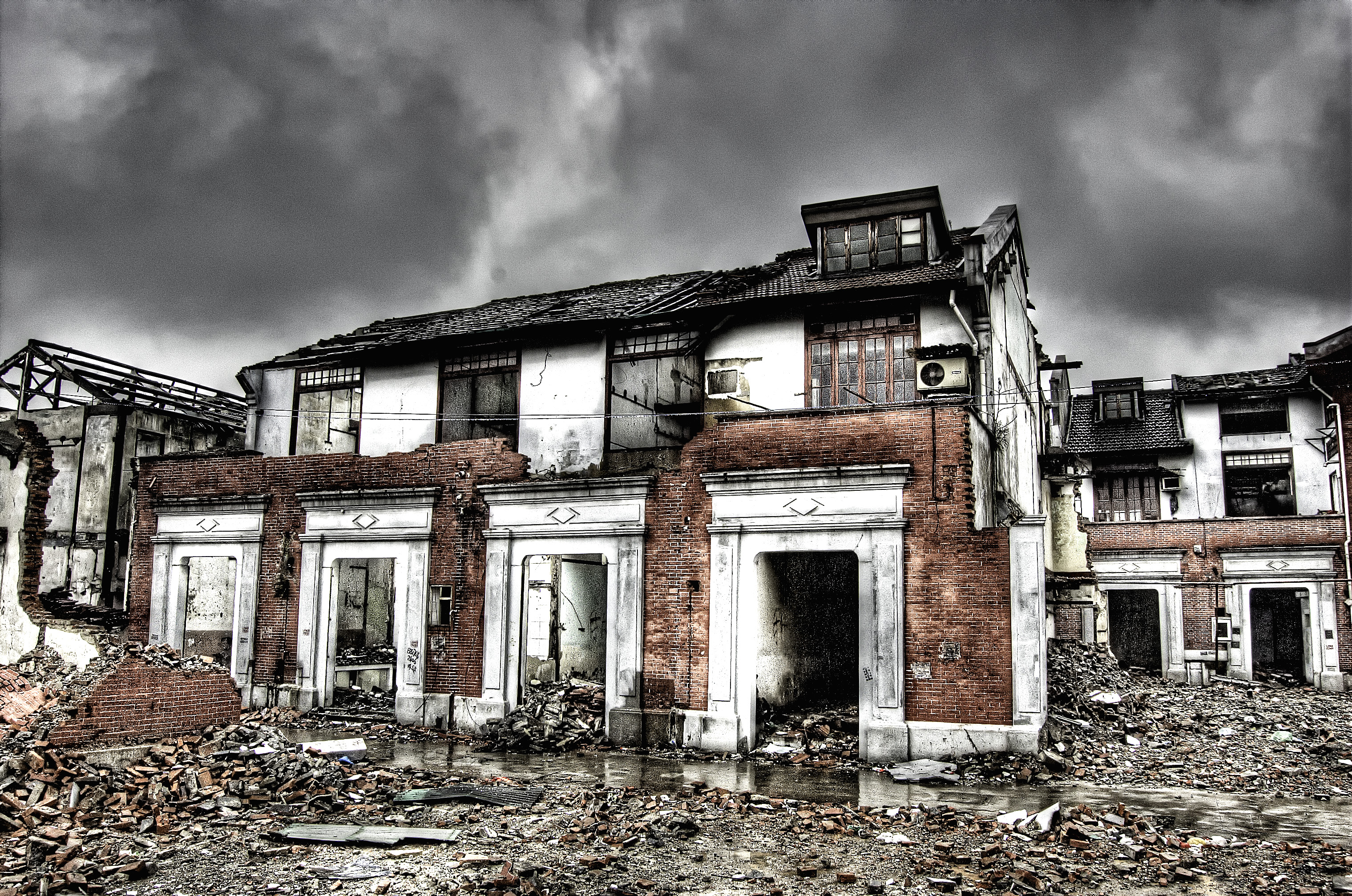 Shanghai, China.